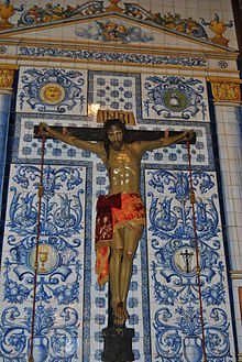 Imagen del Santisimo Cristo de Valdelpozo